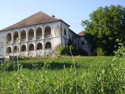 Faţada dinspre râul Târnava Mică a conacului.